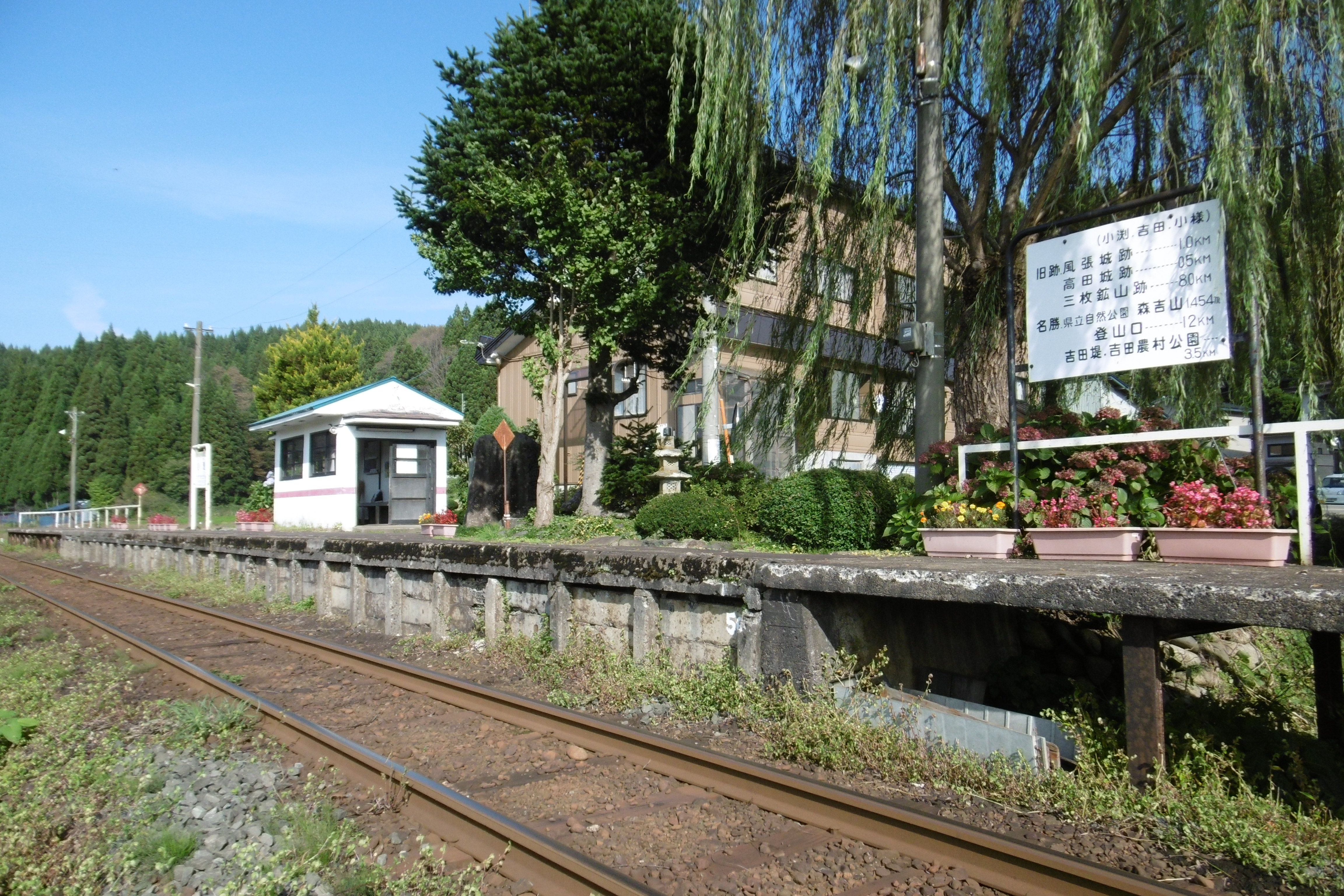 秋田内陸線 小渕駅